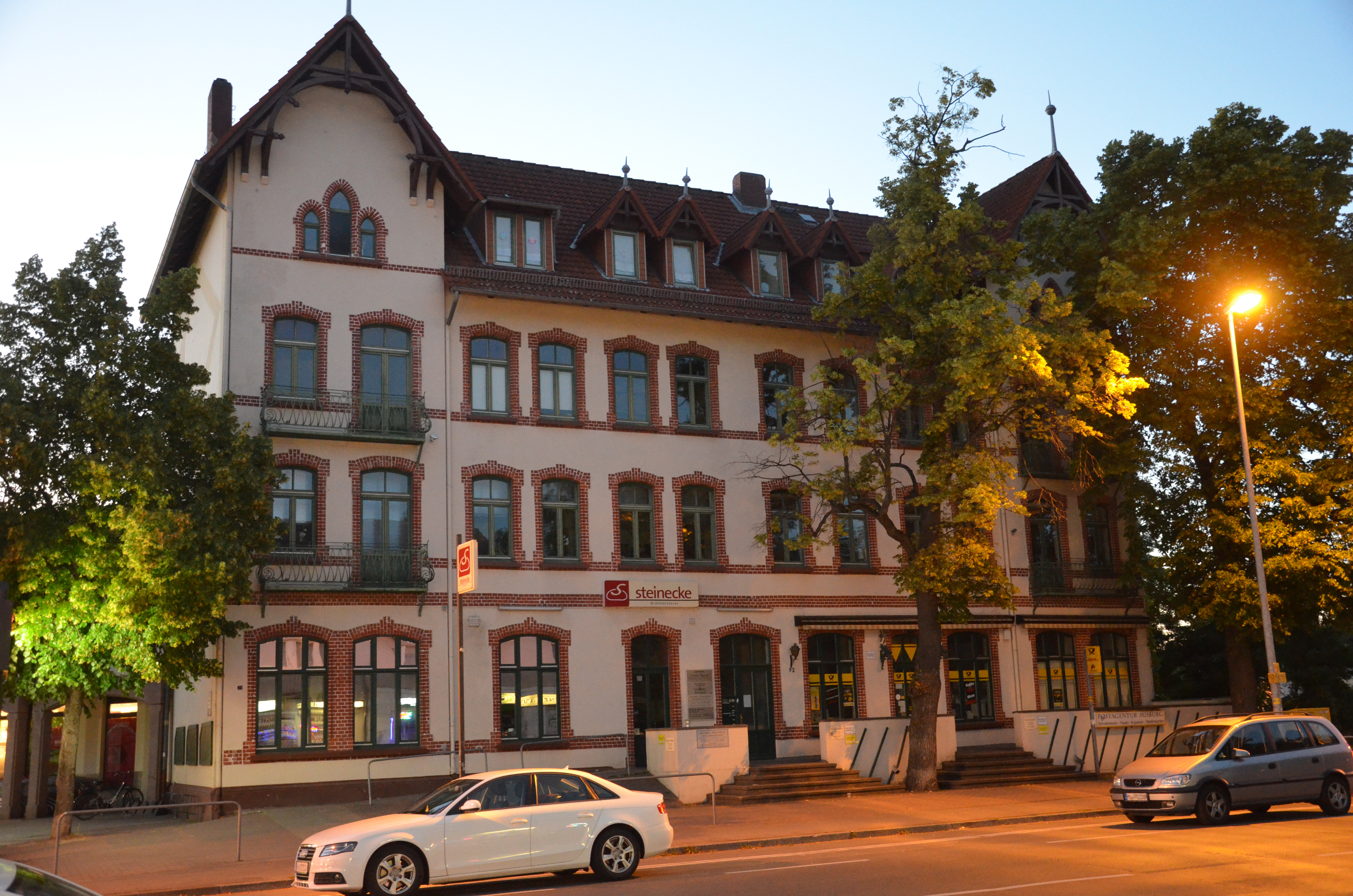 Das 1892 errichtete ehemalige Kurhaus Friedenstal unter der heutigen Adresse Hannoversche Straße 92 in Hannover, Stadtteil Misburg-Nord ...